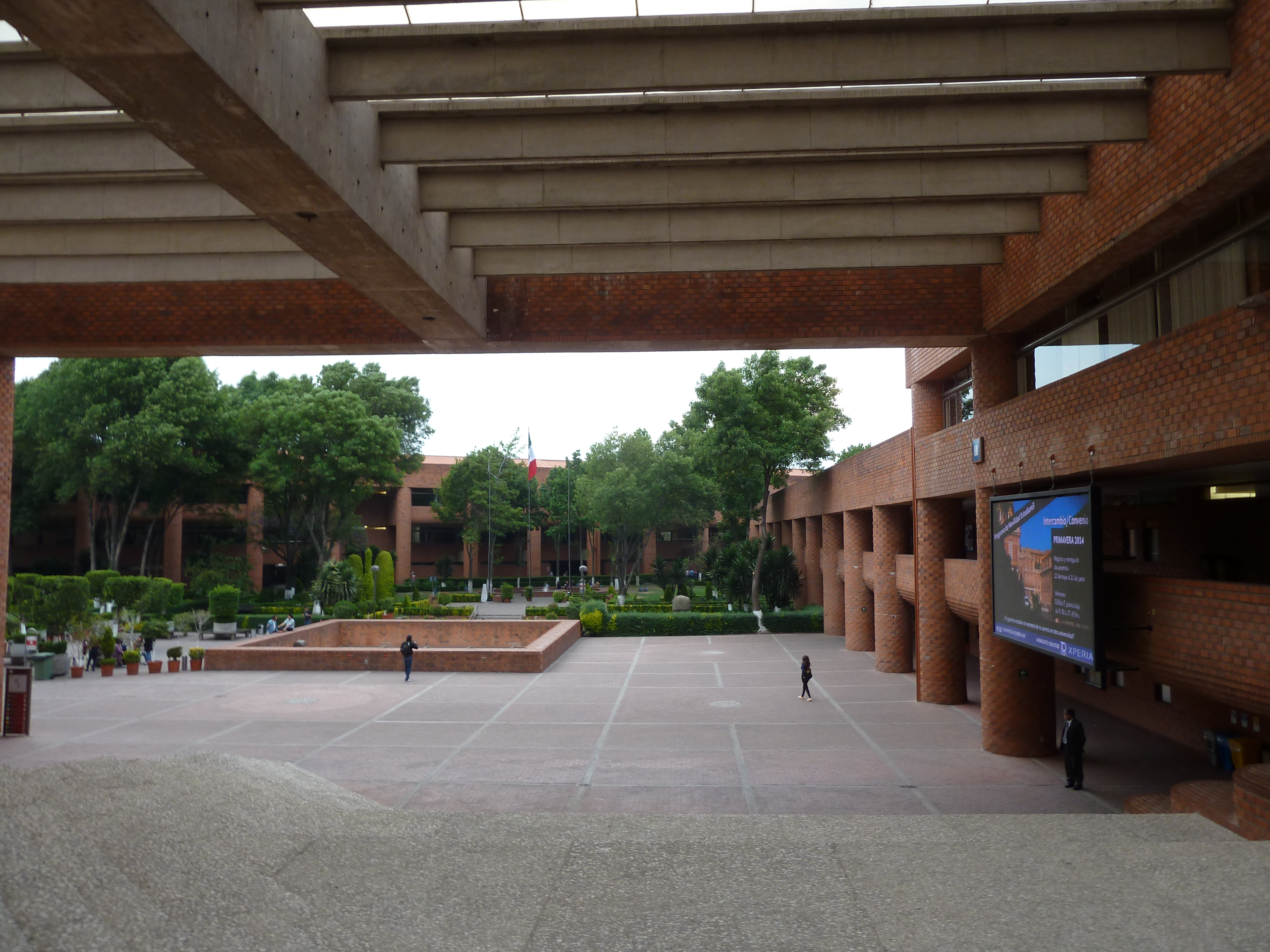 Universidad Iberoamericana, Sede Mexico Santa Fe, atrio central y al fondo edificio Gris